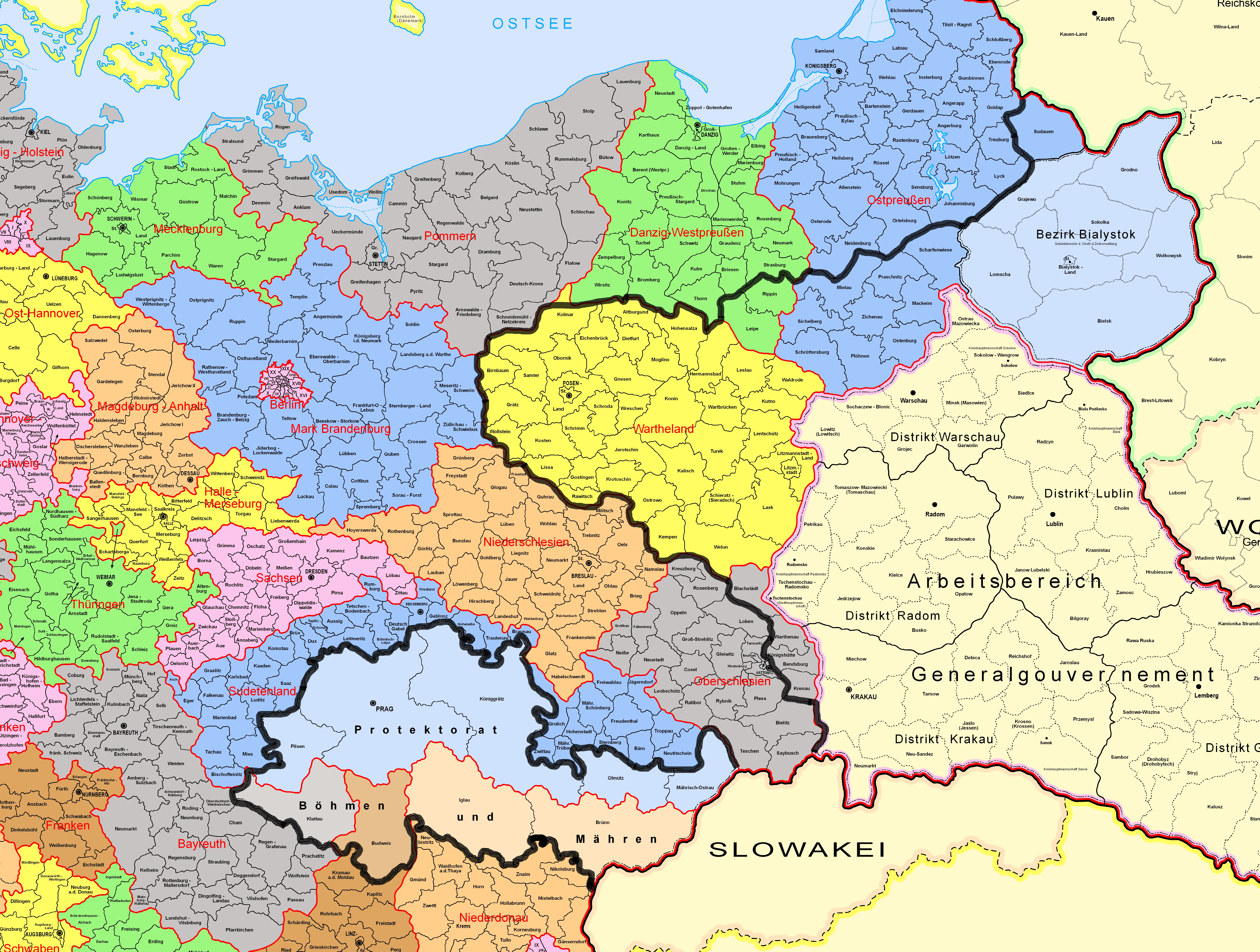 Polizeigrenze in den besetzten Ostgebieten Stand 01.06.1941. Dicke schwarze Linie